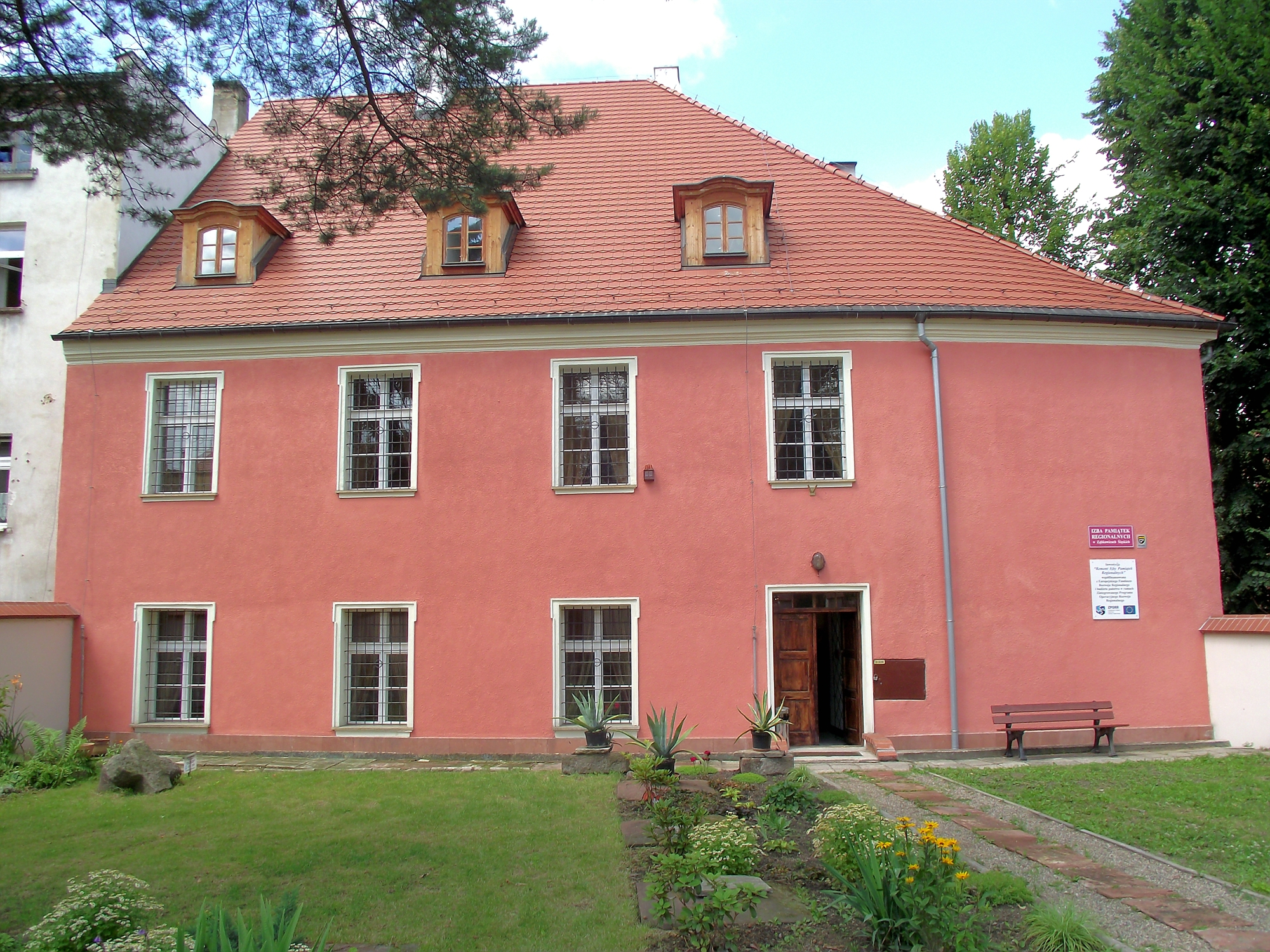 Zabytkowy dom (tzw. Dwór Kauffunga) przy ulicy Krzywej 1 (XVII, XIX w.) w Ząbkowicach Śląskich, obecnie siedziba Izby Pamiątek (zabytek nr rejestr. 1262)